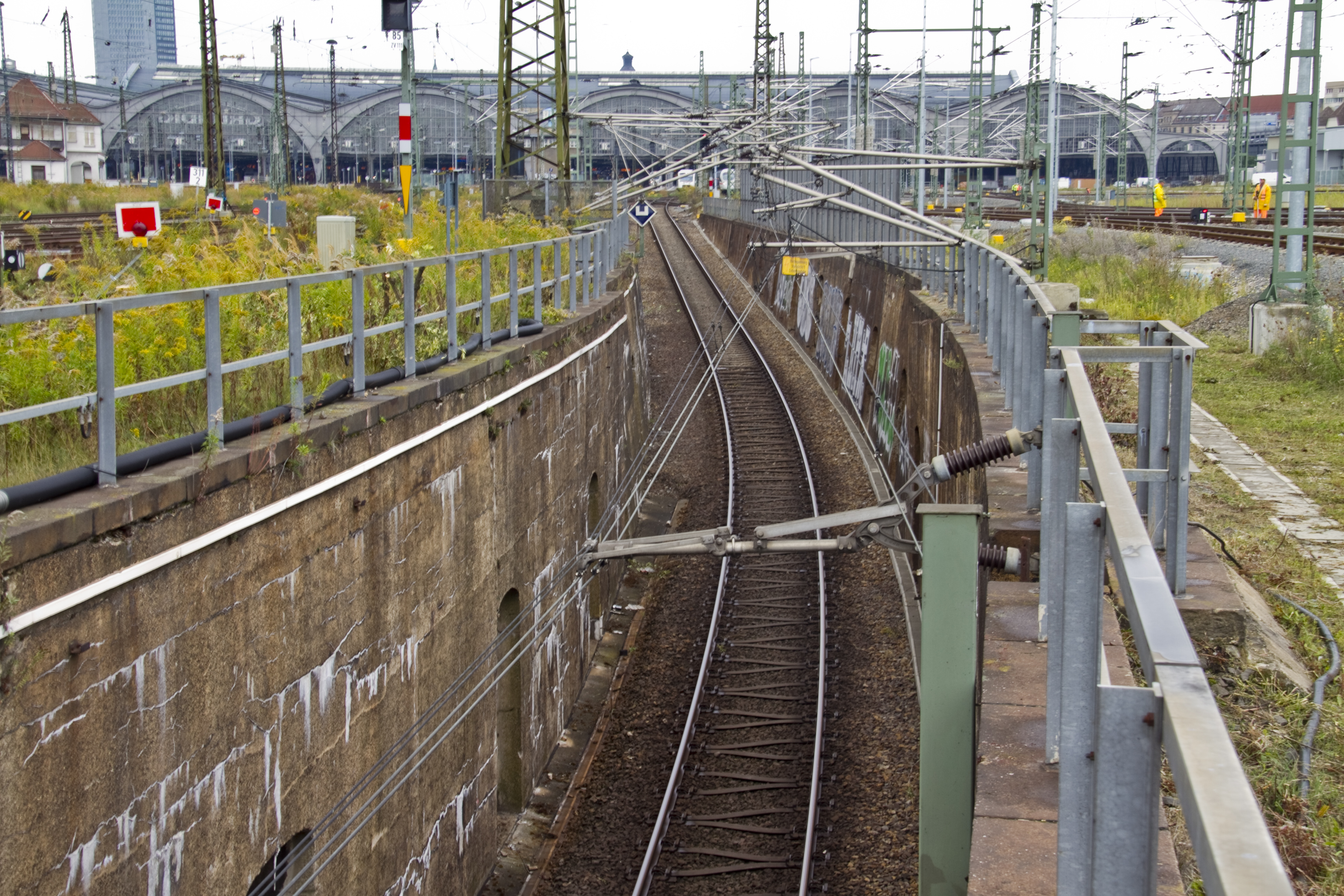 Leipzig Hauptbahnhof, Verkehrstunnel II in Richtung Hauptbahnhof.jpg